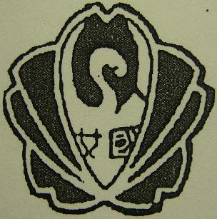 国分高女校章